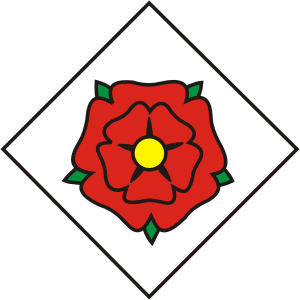 emblema de Reus, per J. Ollé (NO oficial)